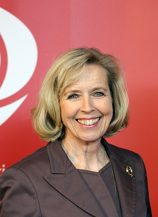 Anne-Grete Strøm Erichsen